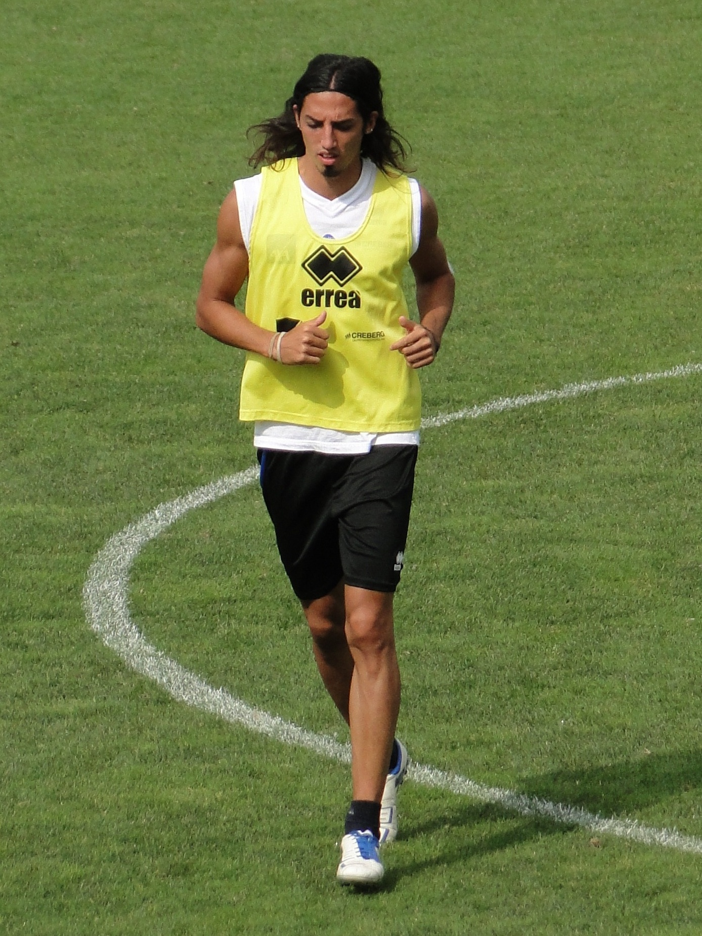 EzequielSchelotto, calciatore argentino naturalizzato italiano